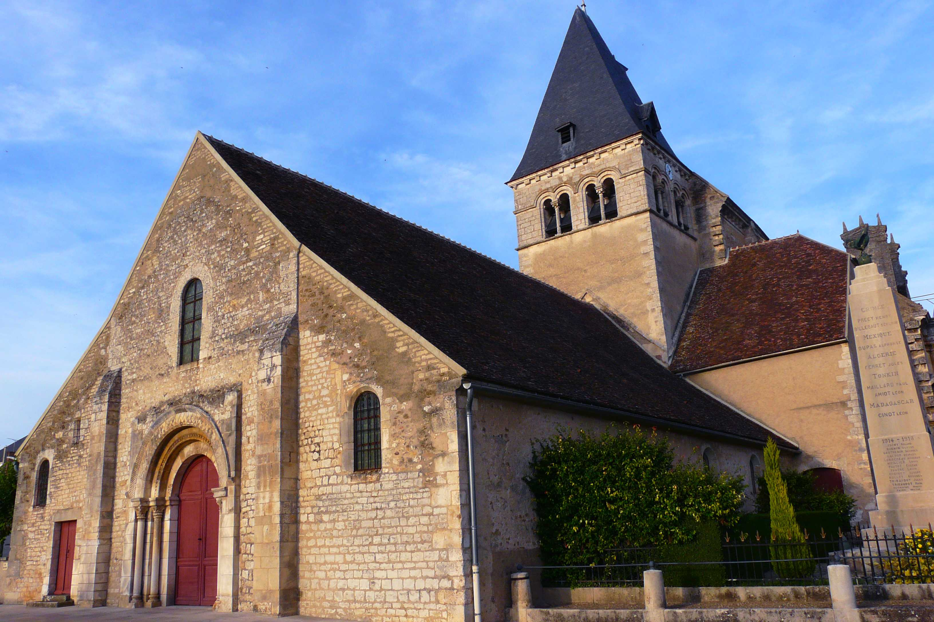 Église de Ligny-le-Châtel (Classé) .